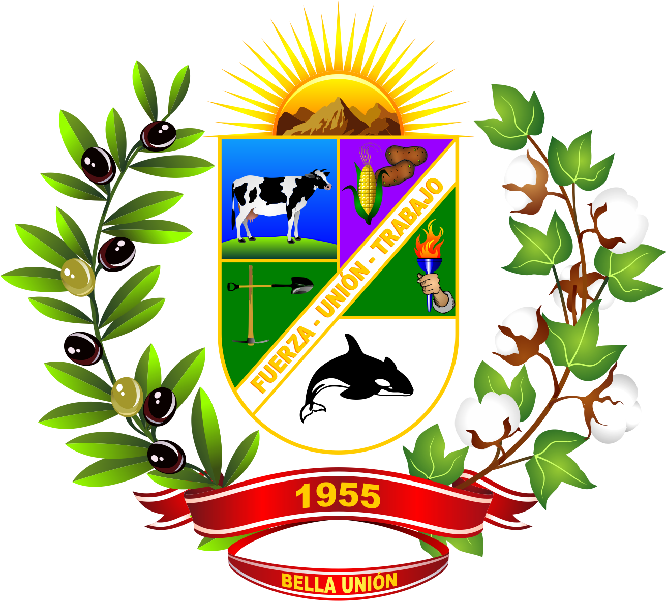 Distrito de Bella Unión